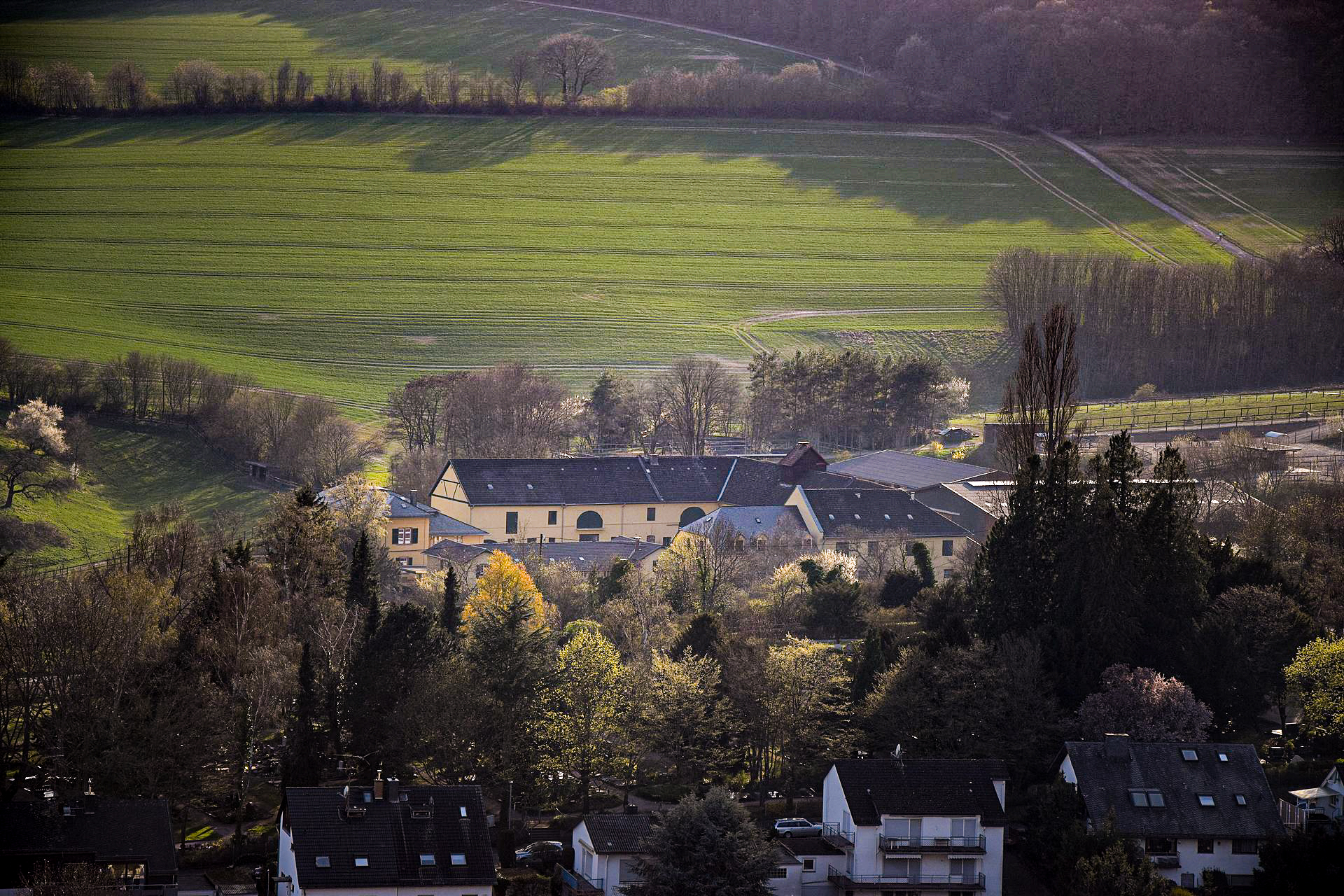 1920px-Wiesbaden Frauenstein Hof Armada von Goethestein-1